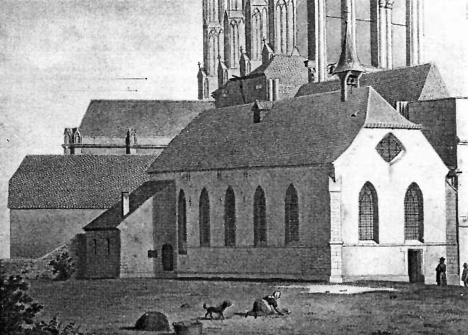 St. Maria im Pesch, Ansicht von NO. Im Hintergrund Teil des Domes. Aquarell von H. Odenthal um 1840